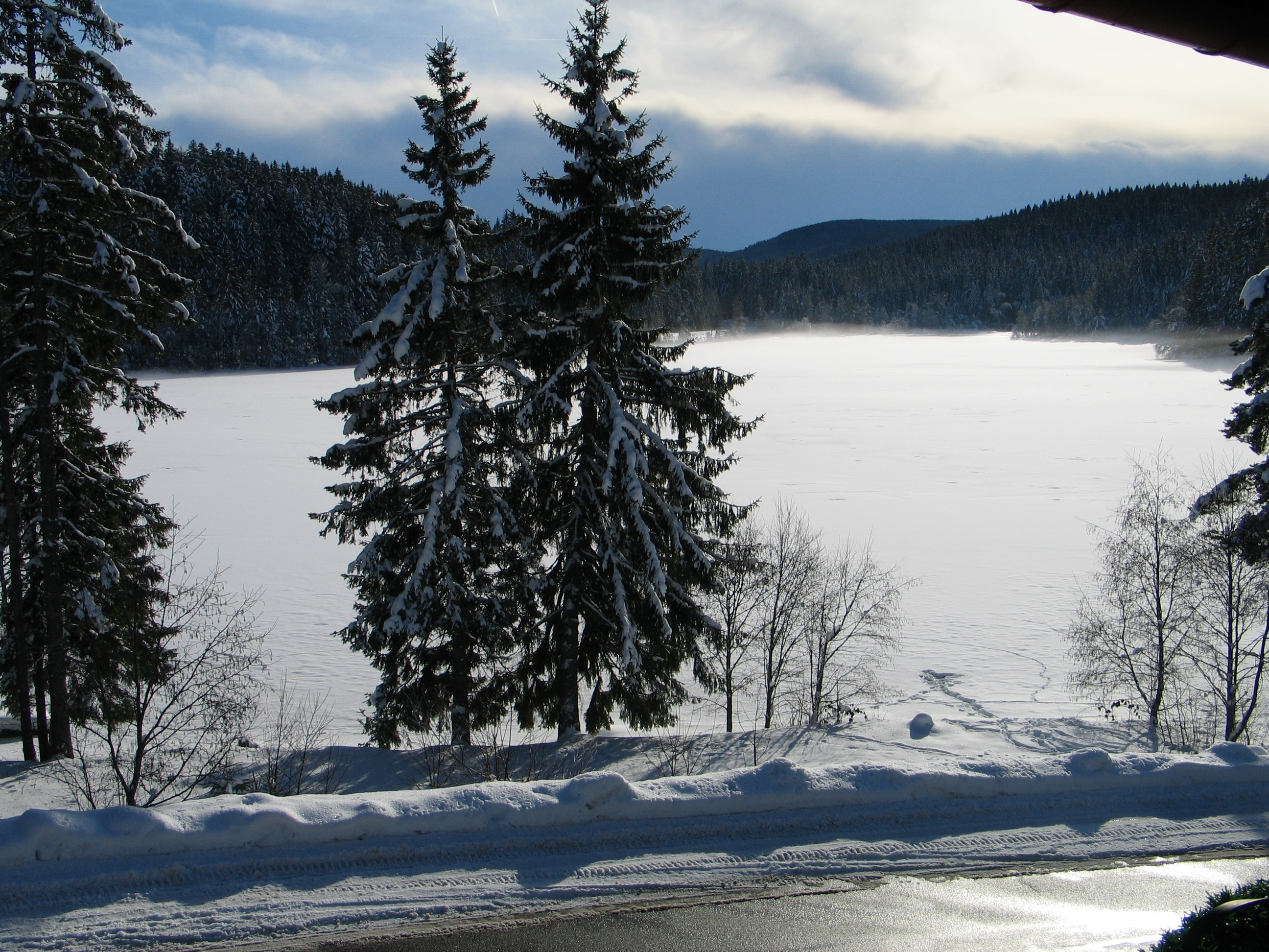 Der Windgfällweiher in Feldberg-Altglashütten, Baden-Württemberg im Winter